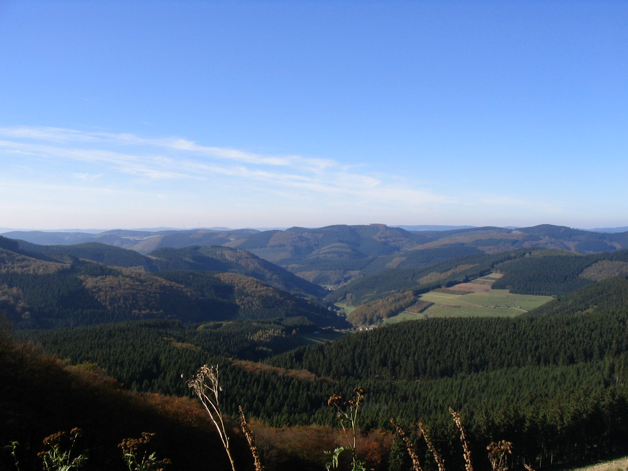 Blick vom Härdler nach Norwesten über Milchenbach hinweg zu den Saalhauser Bergen.